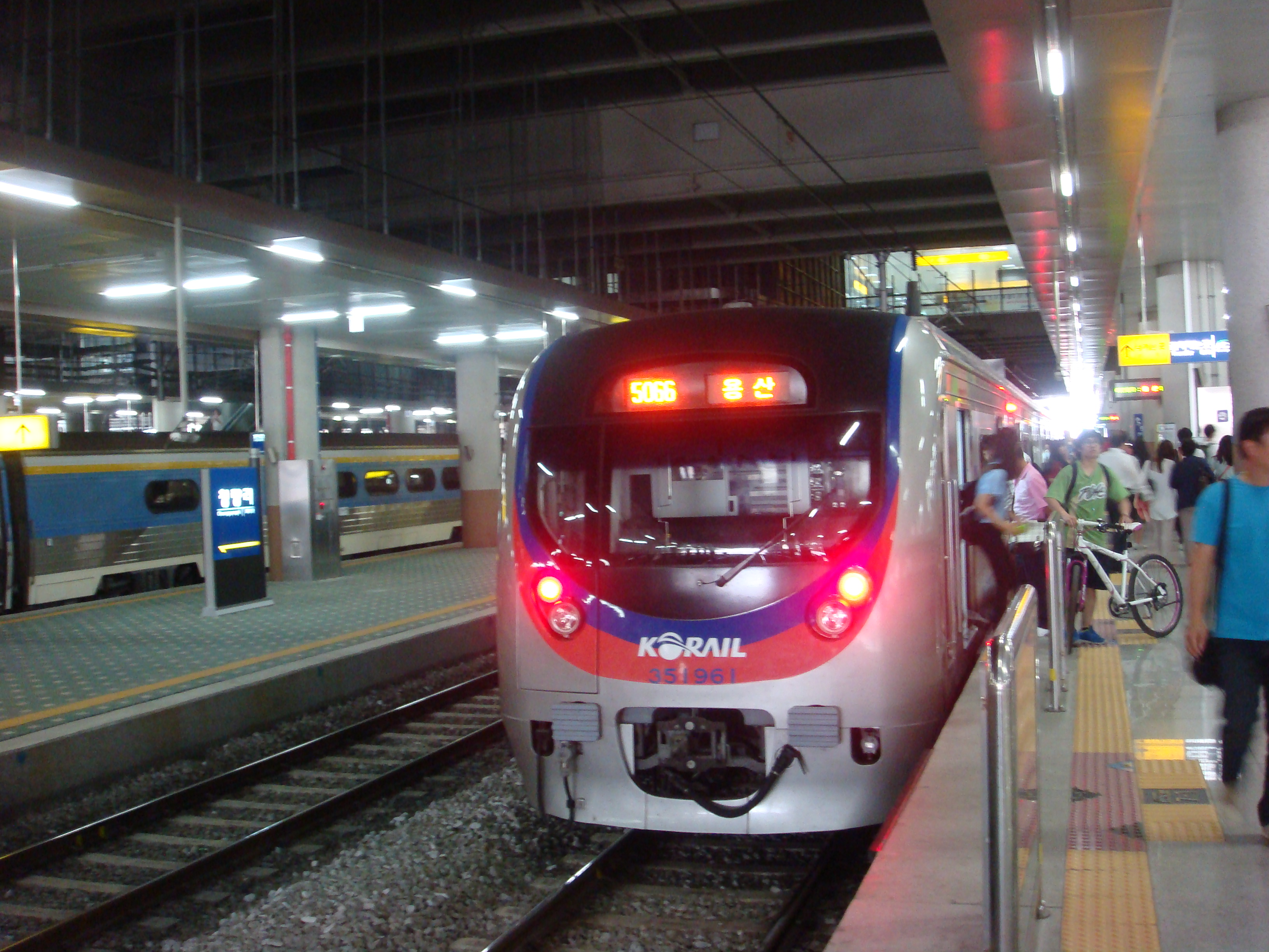 청량리역에 진입하는 35161편성